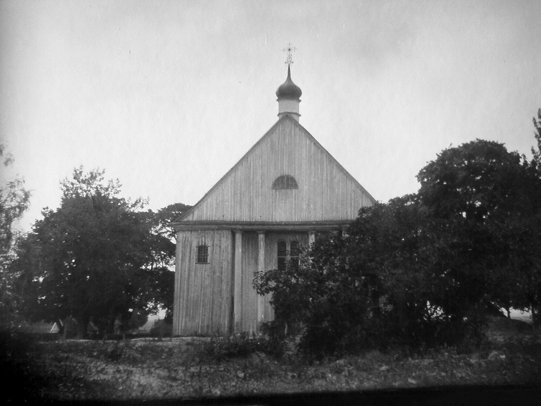 Беларуская (тарашкевіца): Задзьвея (Zadźvieja). Касьцёл